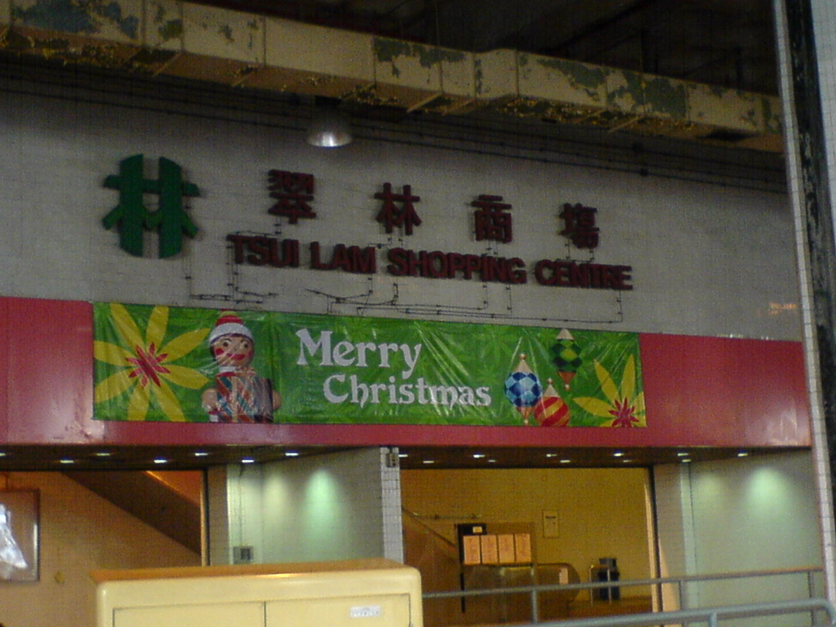 Tsui Lam Estate